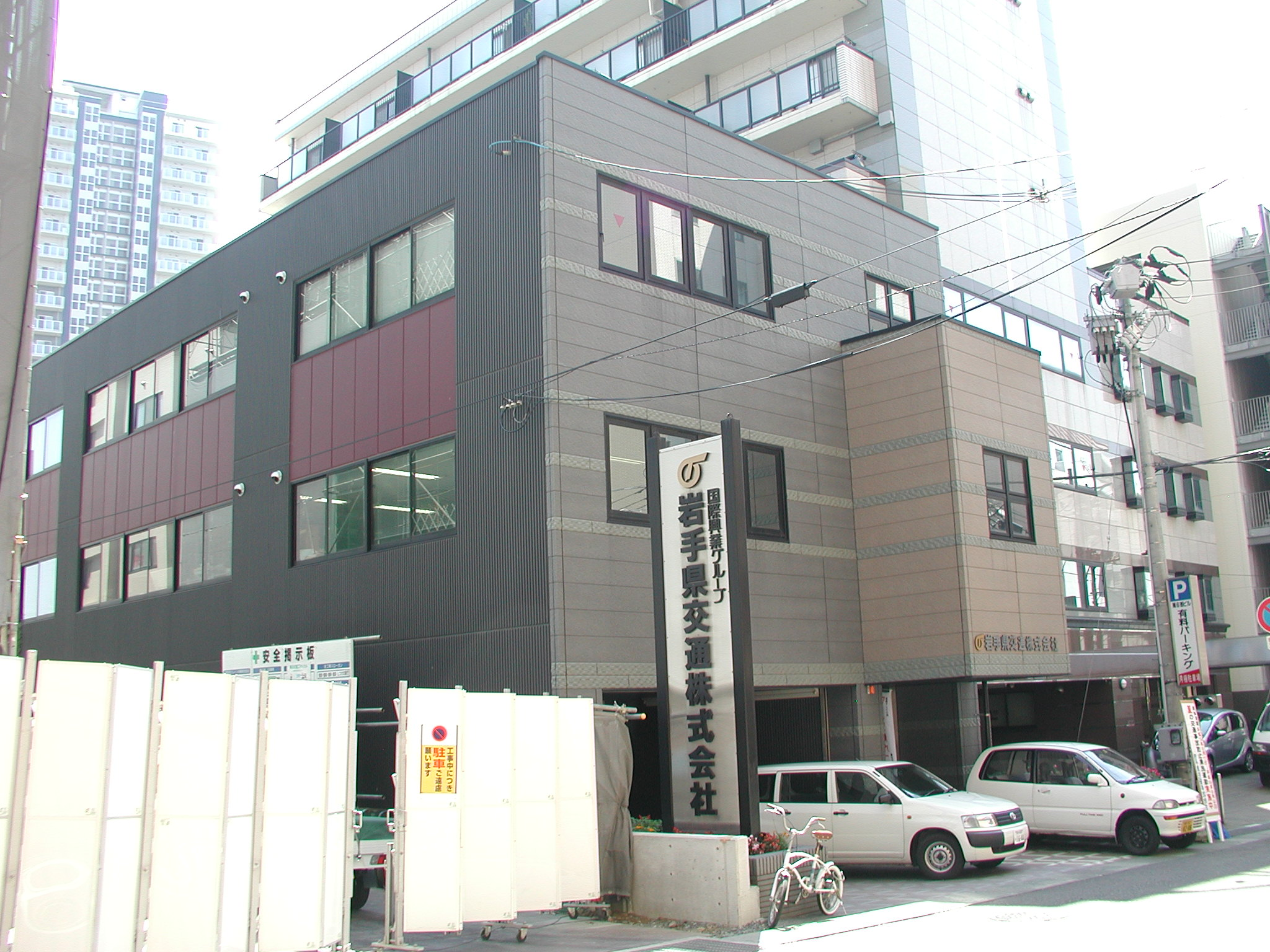 岩手県交通 本社